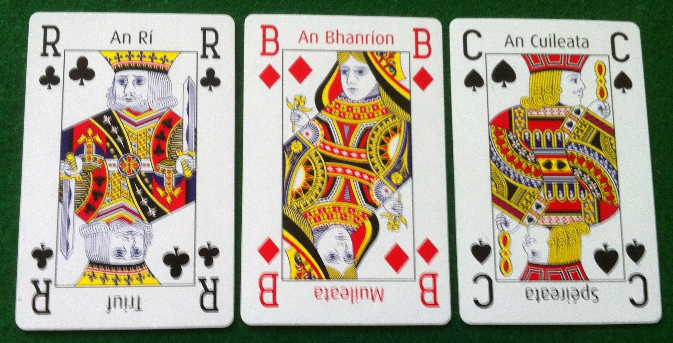 Cártaí Imeartha - na RíChártaí.